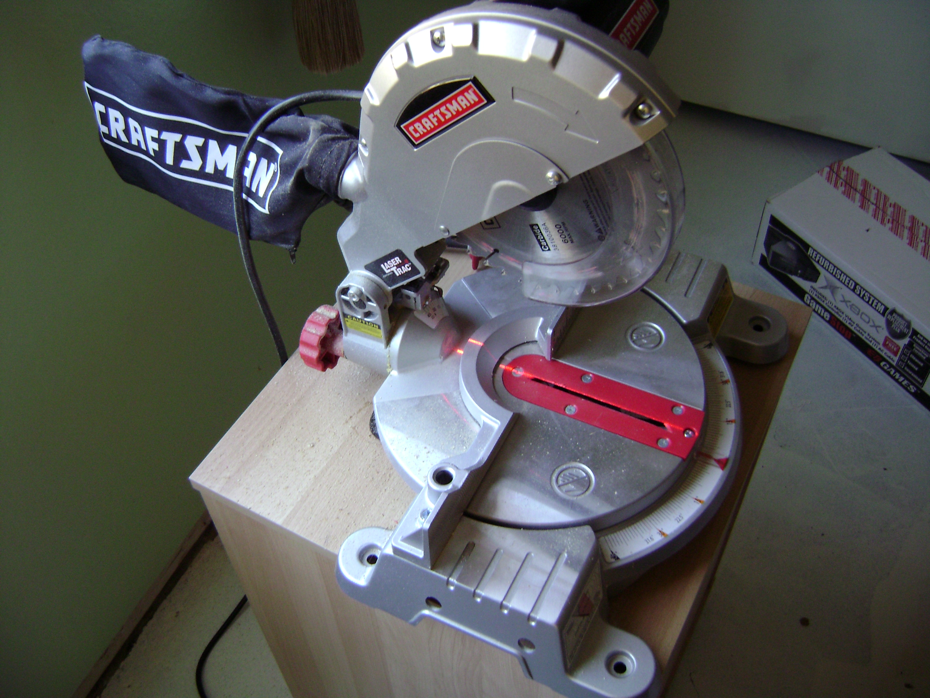 Electric miter saw